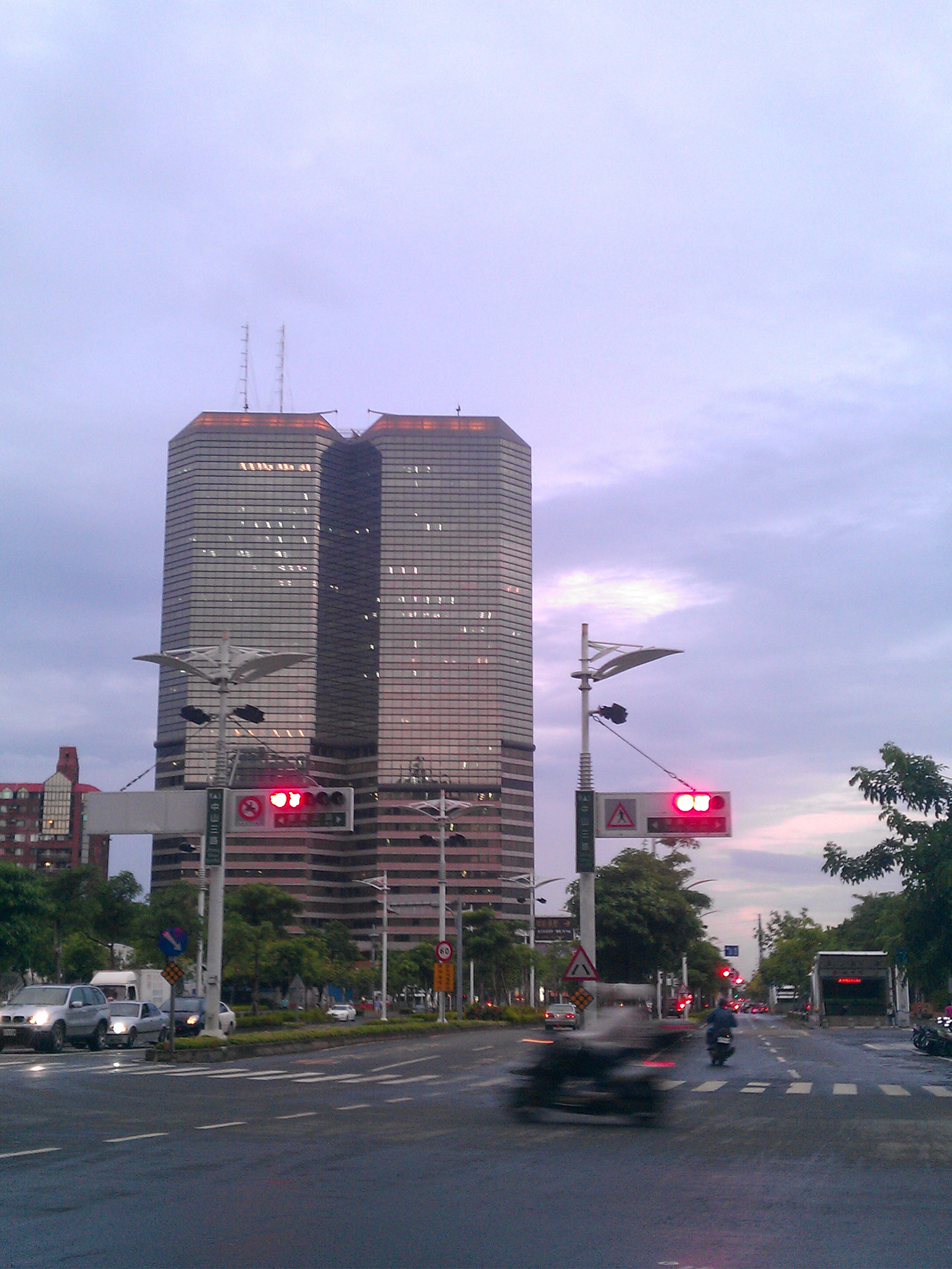 高雄市前鎮區中山三路與復興三路口。寶成企業大樓位於左後方，高雄捷運獅甲站出口位於右下方。